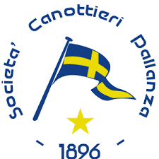 Stemma Canottieri Pallanza